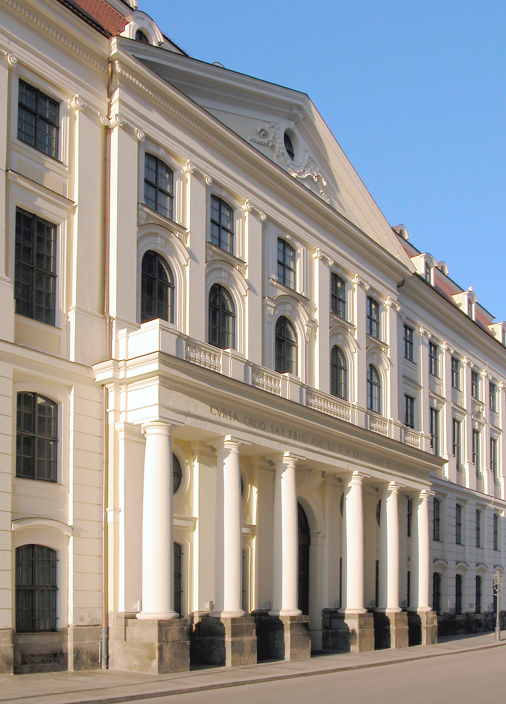 18.02.2007 01067 Dresden-Altstadt: Altes Landhaus, frühklassizistisch (1770-1776 von F. A. Krubsacius). Museum für Stadtgeschichte. Ehem. Hauptportal zur Landhausstraße. [DSCN21087]20070218025DR.JPG(c)Blobelt